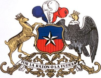 Escudo nacional de Chile